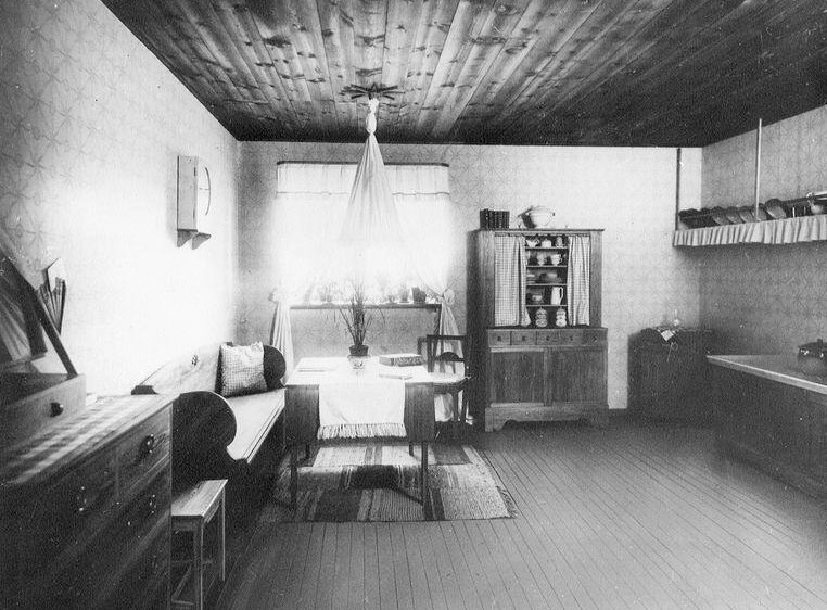 Gunnar Asplunds förslag till "bostadskök" på Hemutställningen 1917 i Stockholm